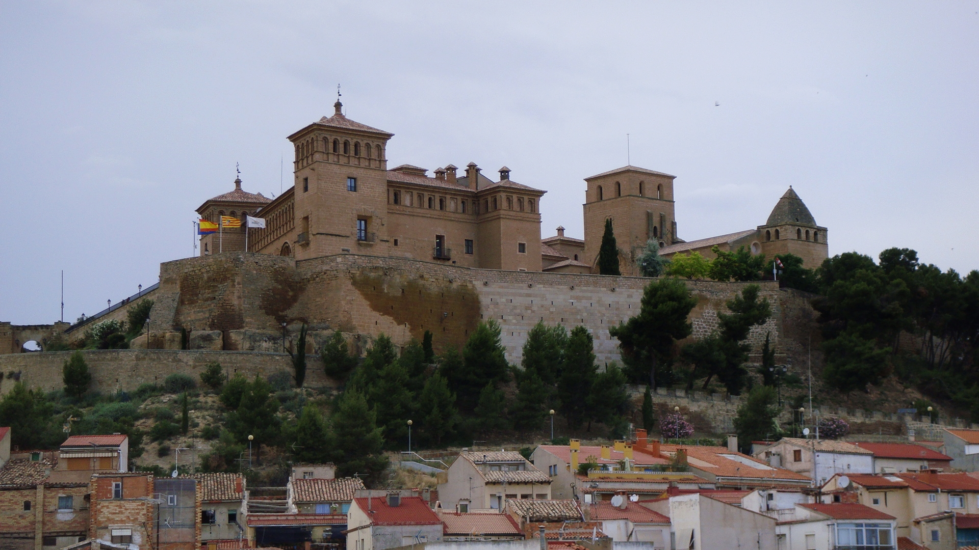 Castillo de Alcañiz, Teruel (Spain)